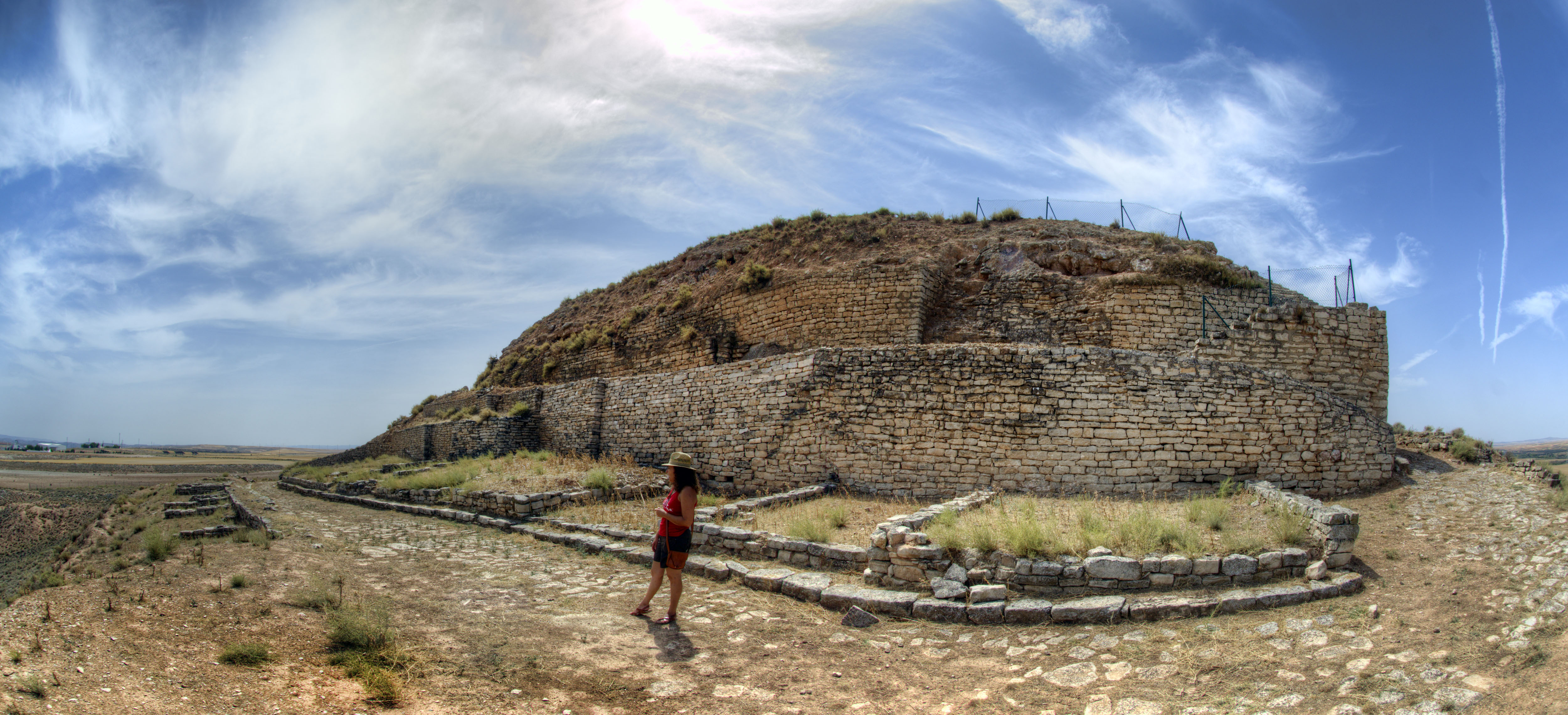 Cabezo de Alcalá es uno de los poblados ibéricos del sur de Aragón. Las excavaciones han encontrado tres fases de ocupación, desde el siglo VII a.C. hasta las guerras sertorianas (80 y 76 a.C.), en las que la ciudad se apuntó al bando perdedor (el de Sertorio) y fue asediada y destruida por las tropas de Pompeyo.